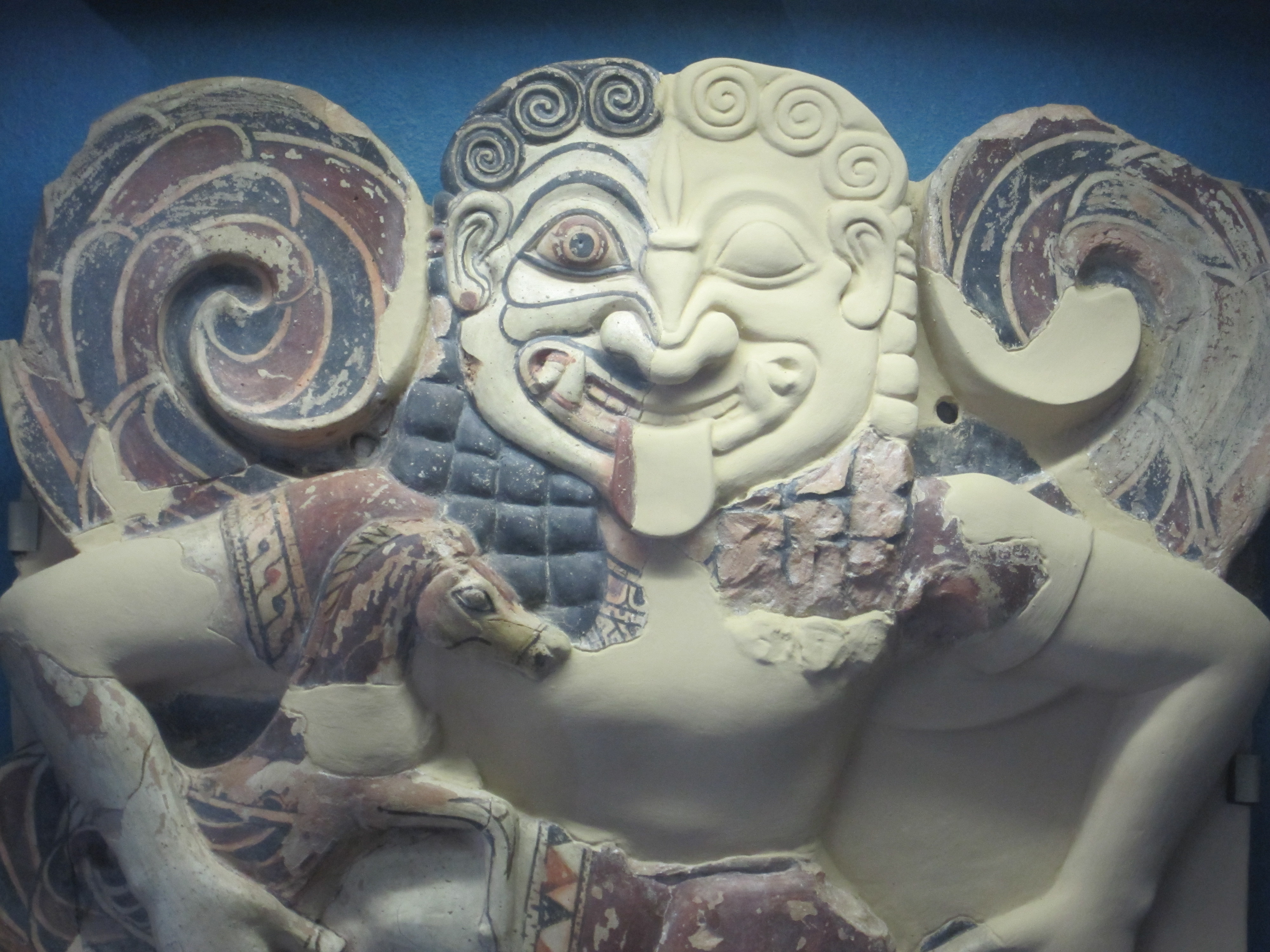 Gorgone, al Museo archeologico regionale di Siracusa "Paolo Orsi".